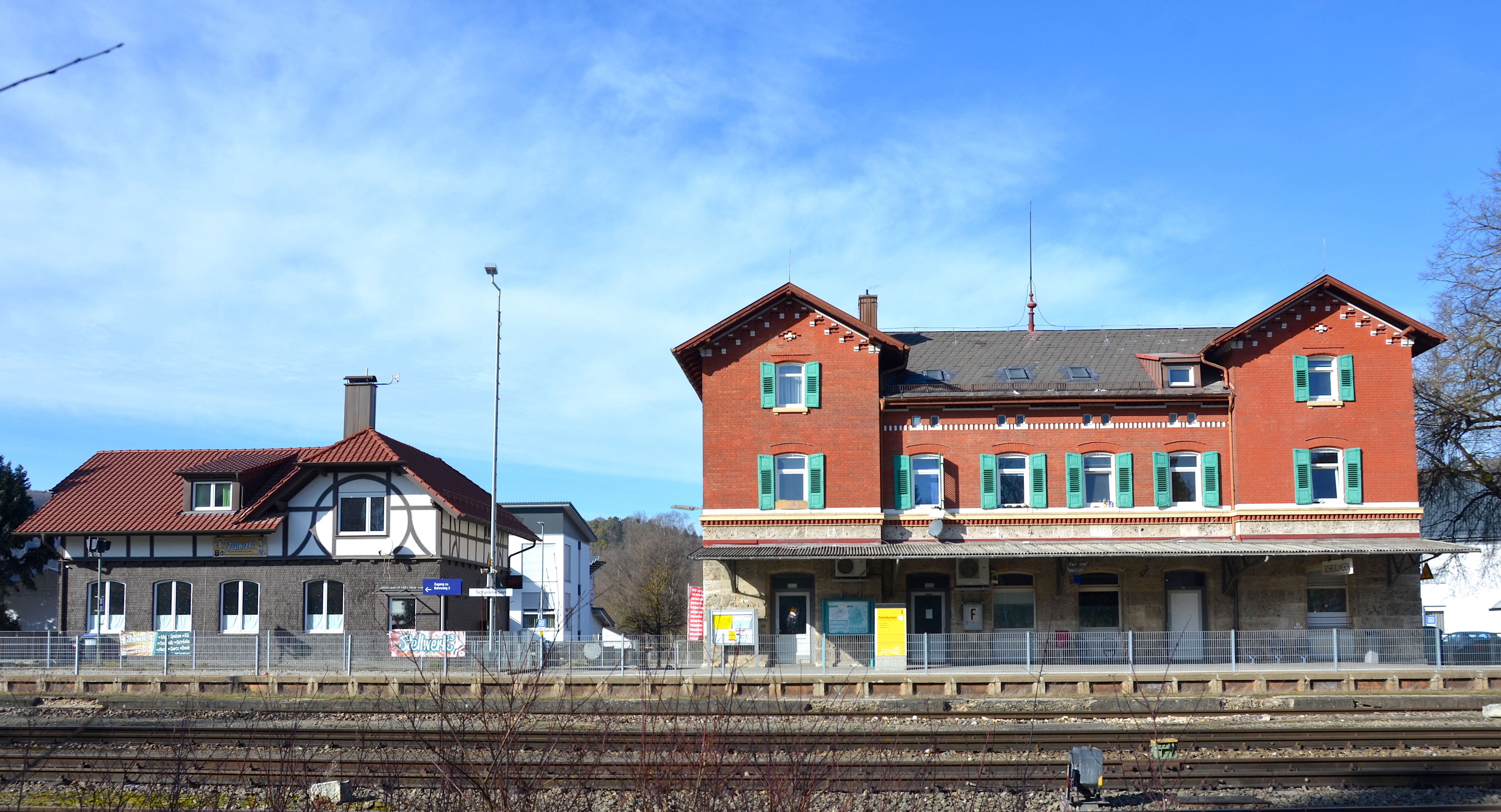 Bahnhof Schelklingen, Baden-Württemberg